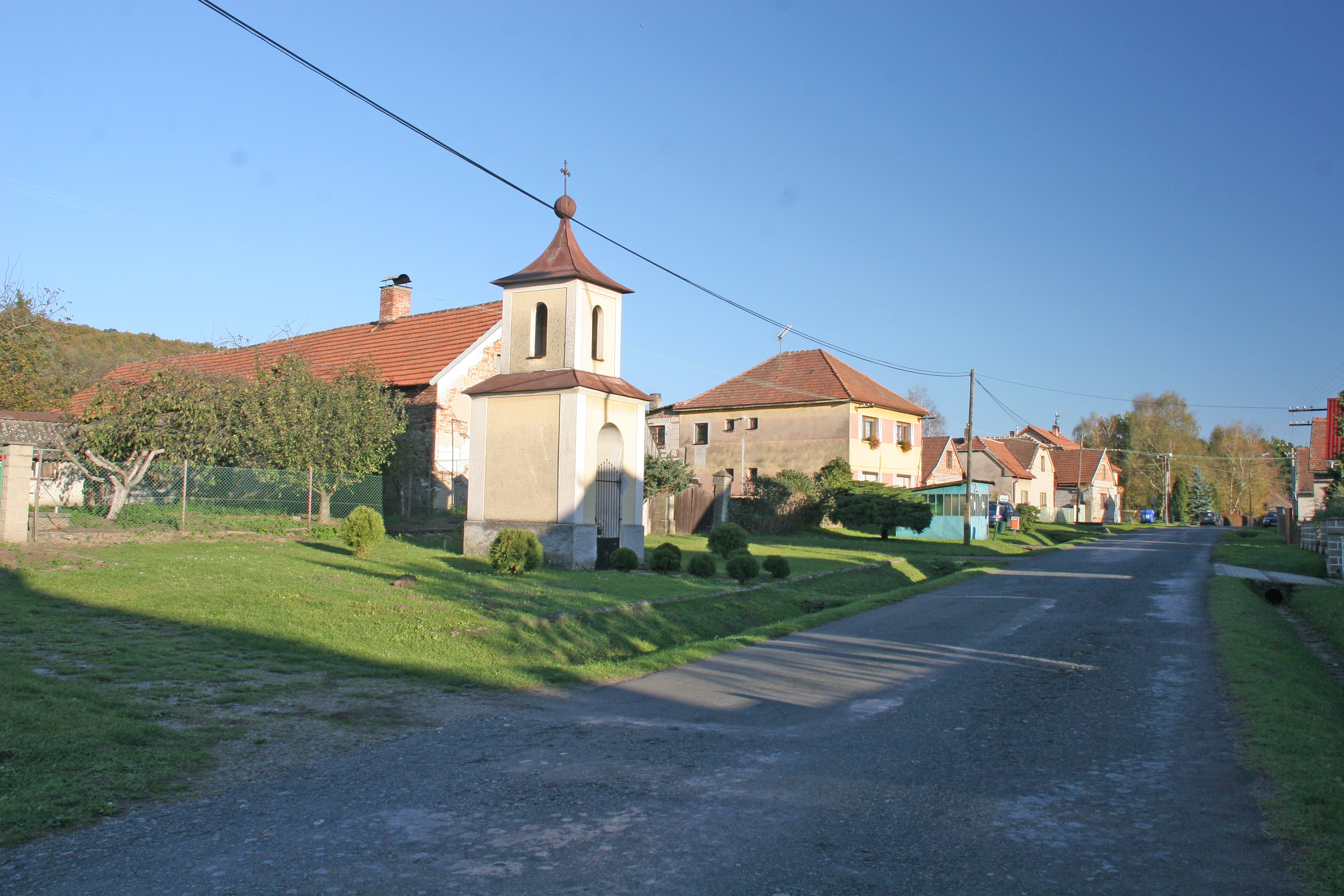 Brambory kaple